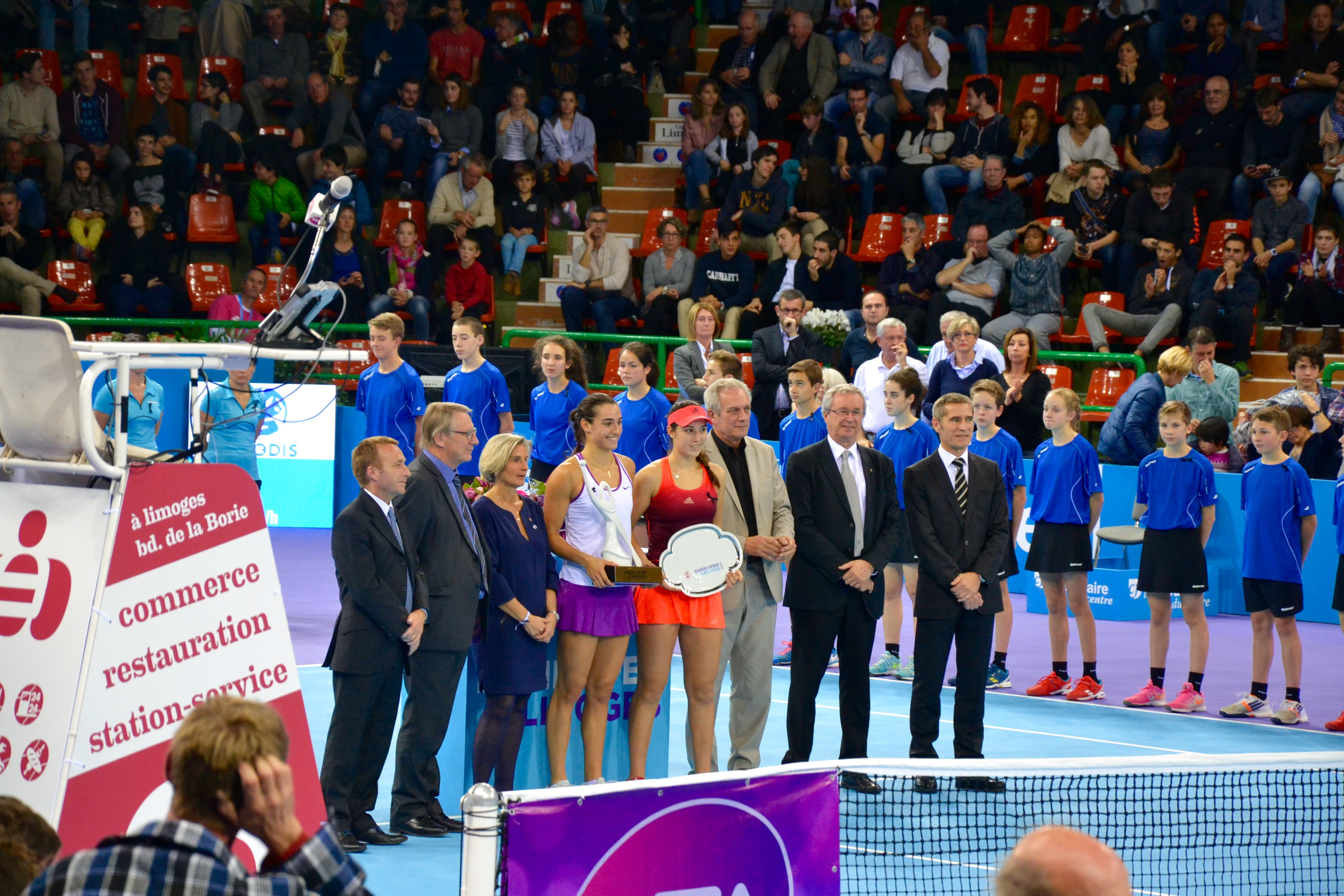 Remise des prix de l'épreuve de simple du tournoi de tennis de Limoges 2015.